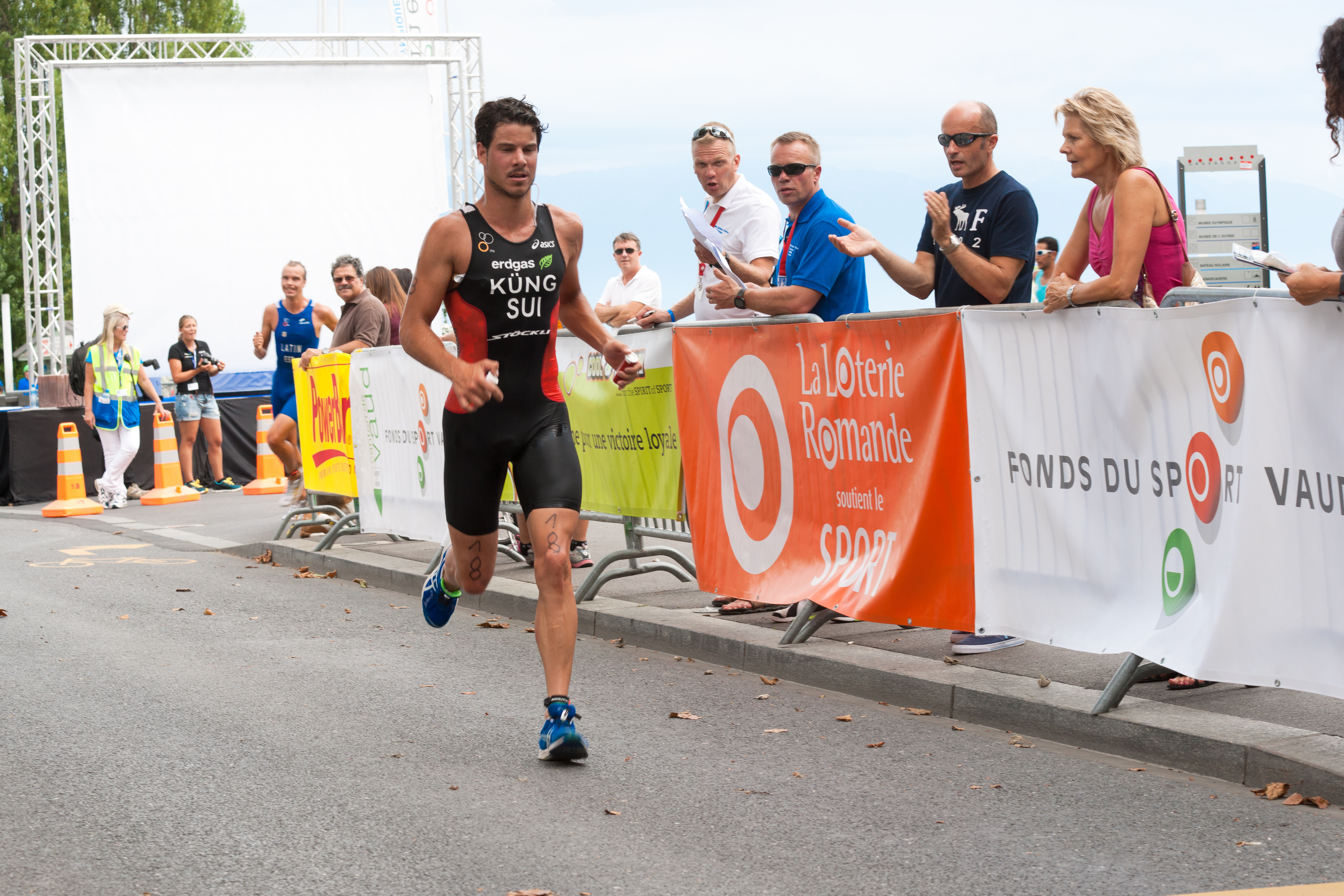 Triathlon de Lausanne 2012 - Manuel Küng